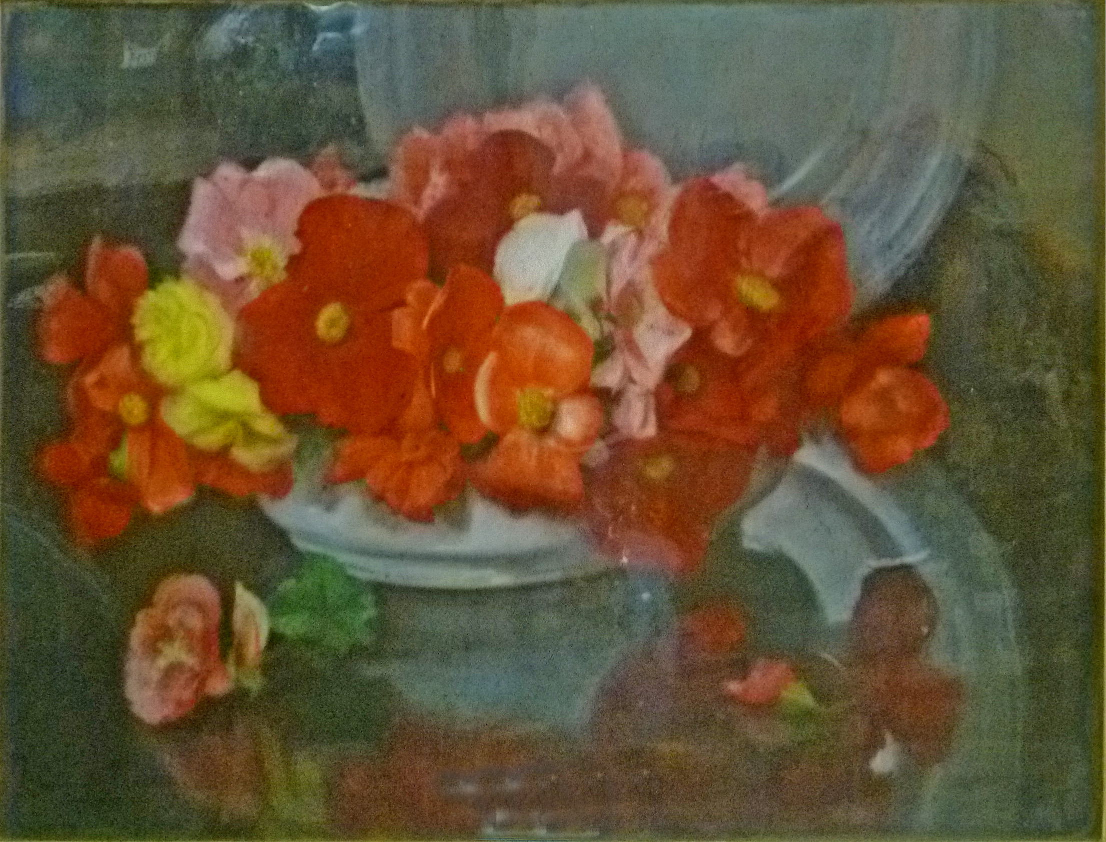 "Begonia's", pastel (52 x 70 cm) door de Belgische kunstschilder Jef Van de Fackere (1879-1946); privebezit